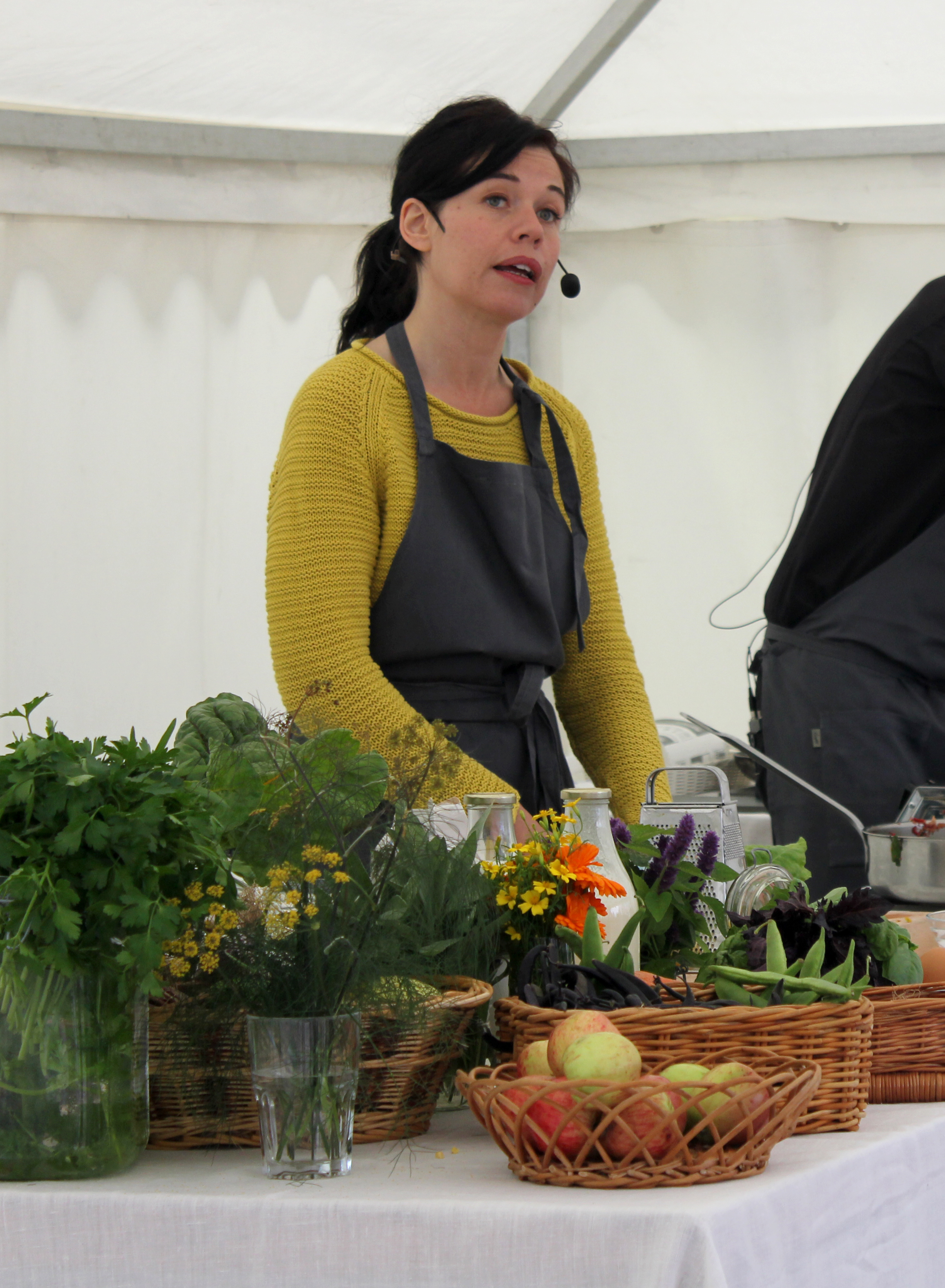 Lotta Lundgren vid matmarknaden Jordens mat, Gunnebo slott, Mölndal, 2012.